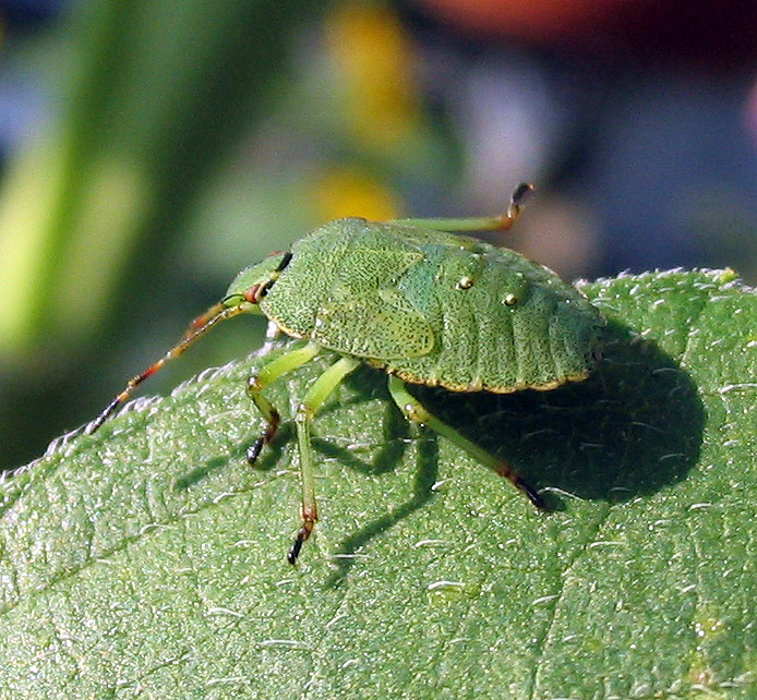 Beschreibung: Gemeine Stinkwanze (Palomena prasina) Fotograf: Darkone, 5. September 2004